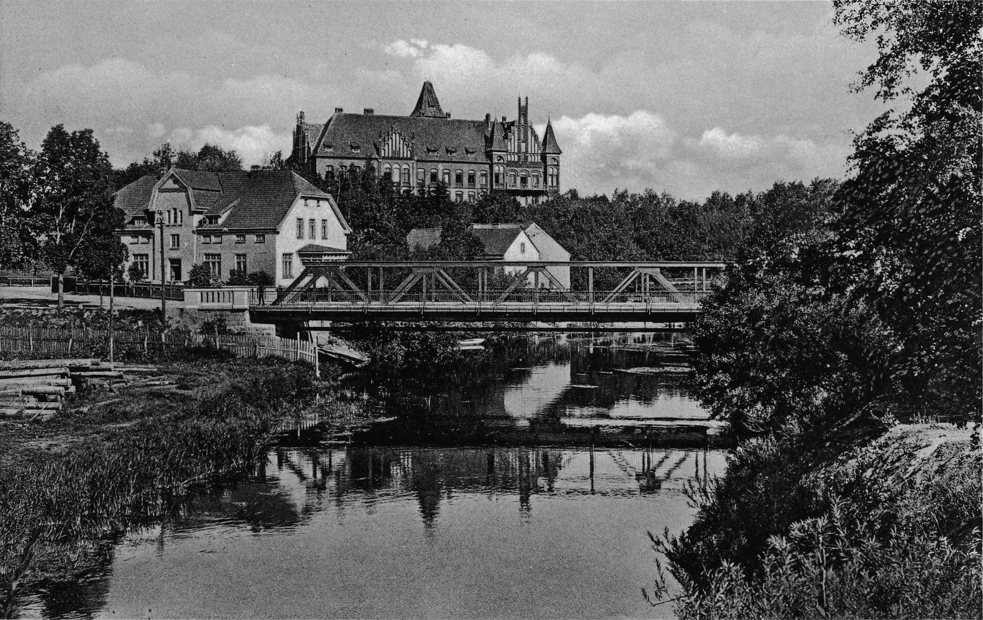 Bartoszyce, w oddali nieistniejący od 1945 budynek starostwa powiatowego.